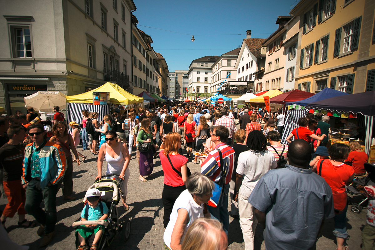 Afro-Pfingsten Festival Markt